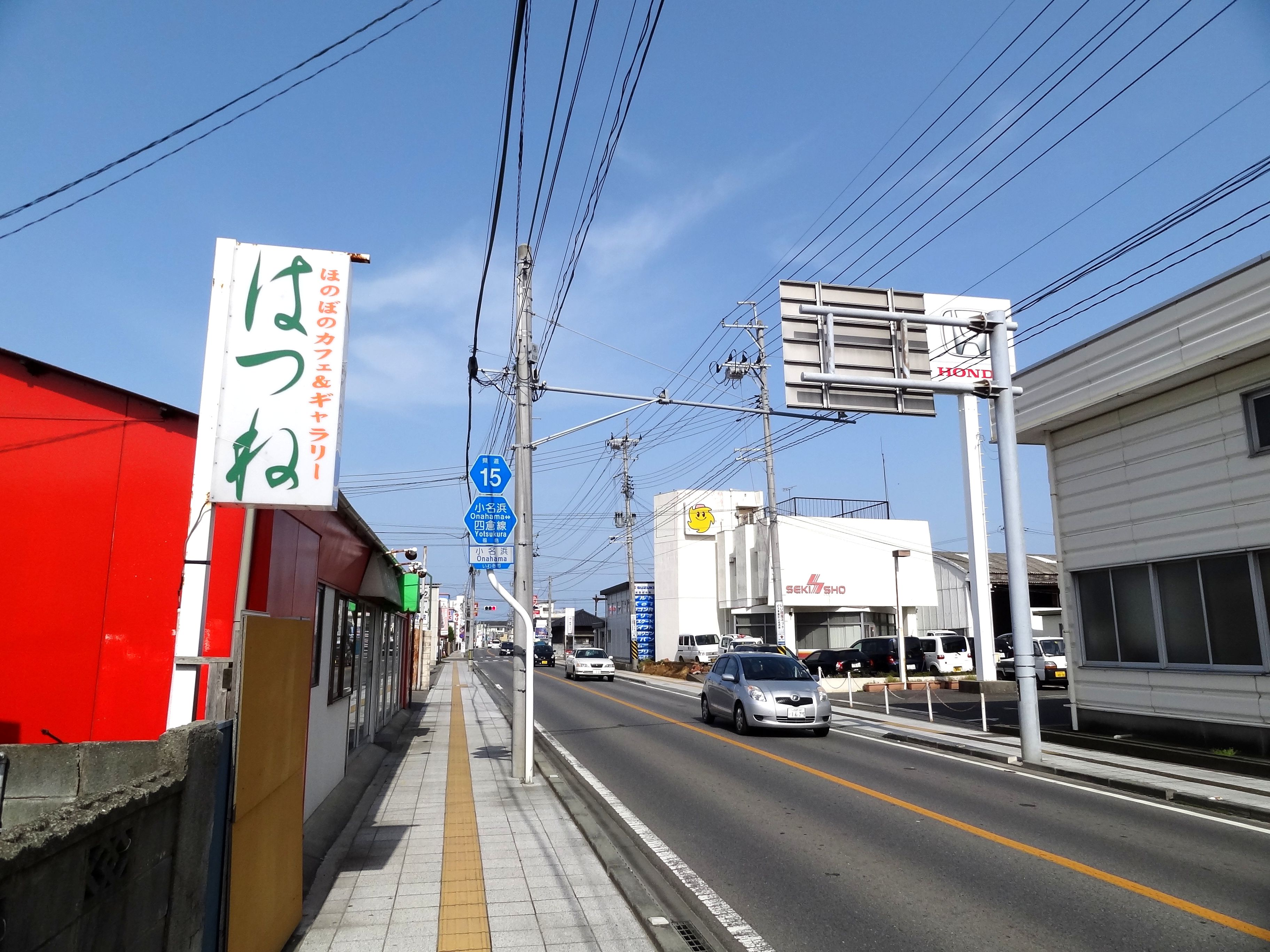 福島県道15号小名浜四倉線 いわき市小名浜付近